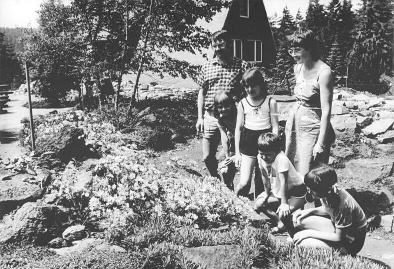 Oberhof, Rennsteiggarten, Besucher ADN-ZB Schaar 9.8.84 Bez. Suhl: Entstanden in der DDR- Dem Rennsteiggarten auf dem 870m hohen Pfanntalskopf in der Nähe von Oberhof statten viele Thüringen-Urlauber einen Besuch ab. Auch der Werkzeugmacher Klaus Mering aus Karl-Marx-Stadt besichtigt mit seiner Frau und den vier Kindern diese Anlage, deren erster Teil 1977 der Öffentlichkeit übergeben wurde. Man sieht in diesem größten landeskulturellen Zentrum des Kulturbandes der DDR die attraktivsten Gebirgspflanzen und die wichtigsten Vertreter der Pflanzenwelt europäischer Gebirge. (siehe 6N)